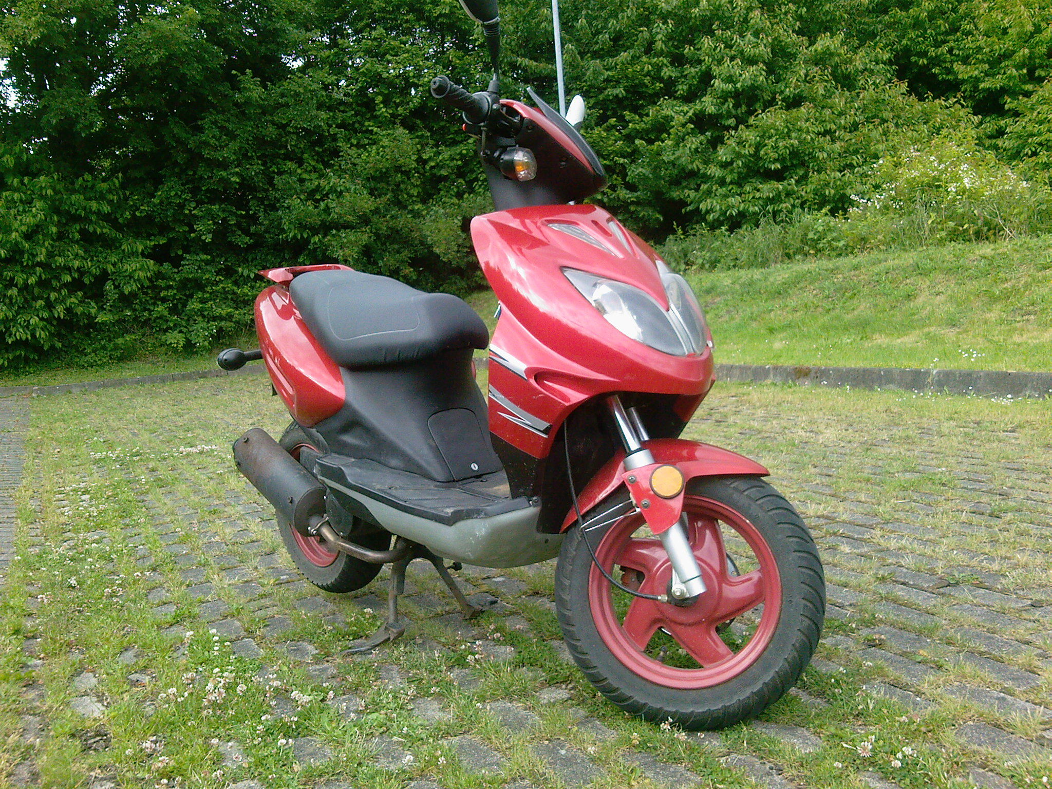 Foto eines Keeway Focus 50 Bj. 2005